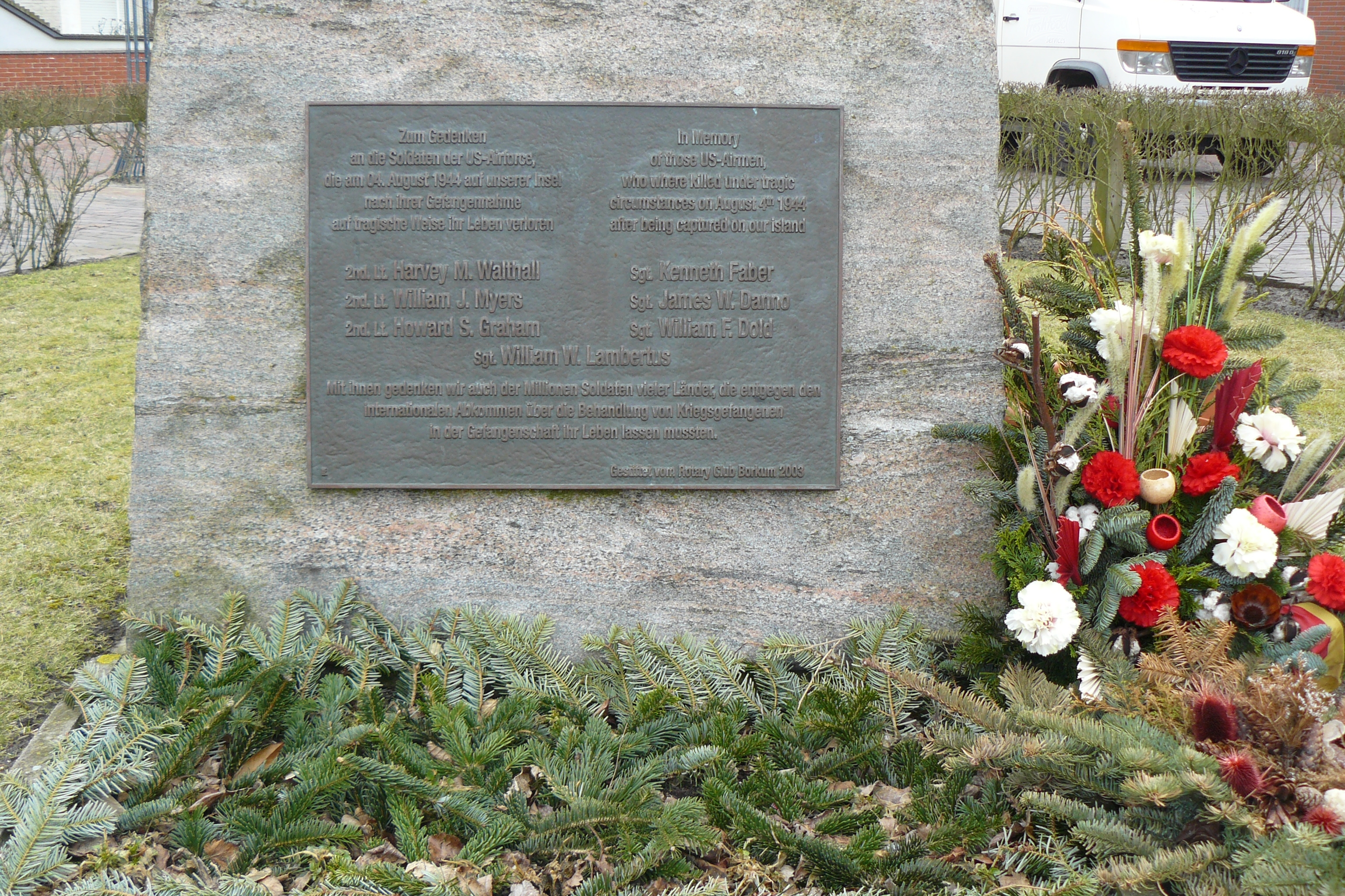 Gedenktafel für die Besatzung der notgelandeten B 17 auf Borkum im August 1944